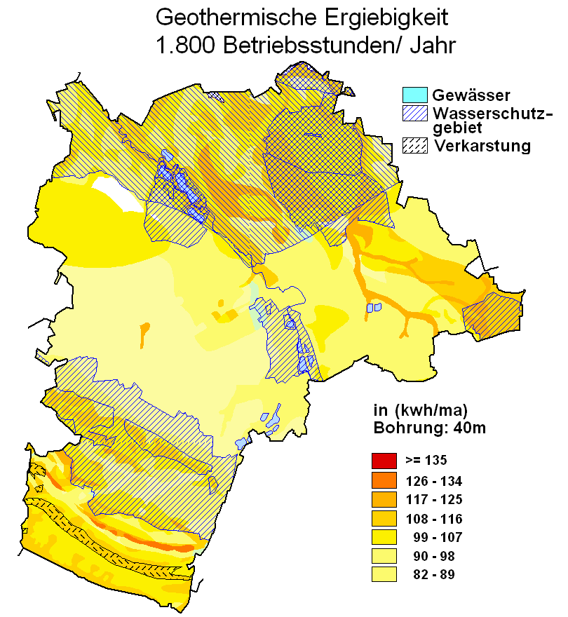 geothermische Karte Lage (Lippe)